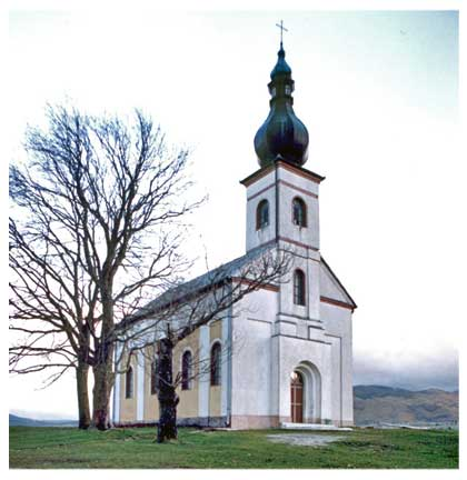 Црква светих апостола Петра и Павла у Калиновику